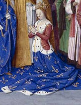 Korunovace Marie Brabantské